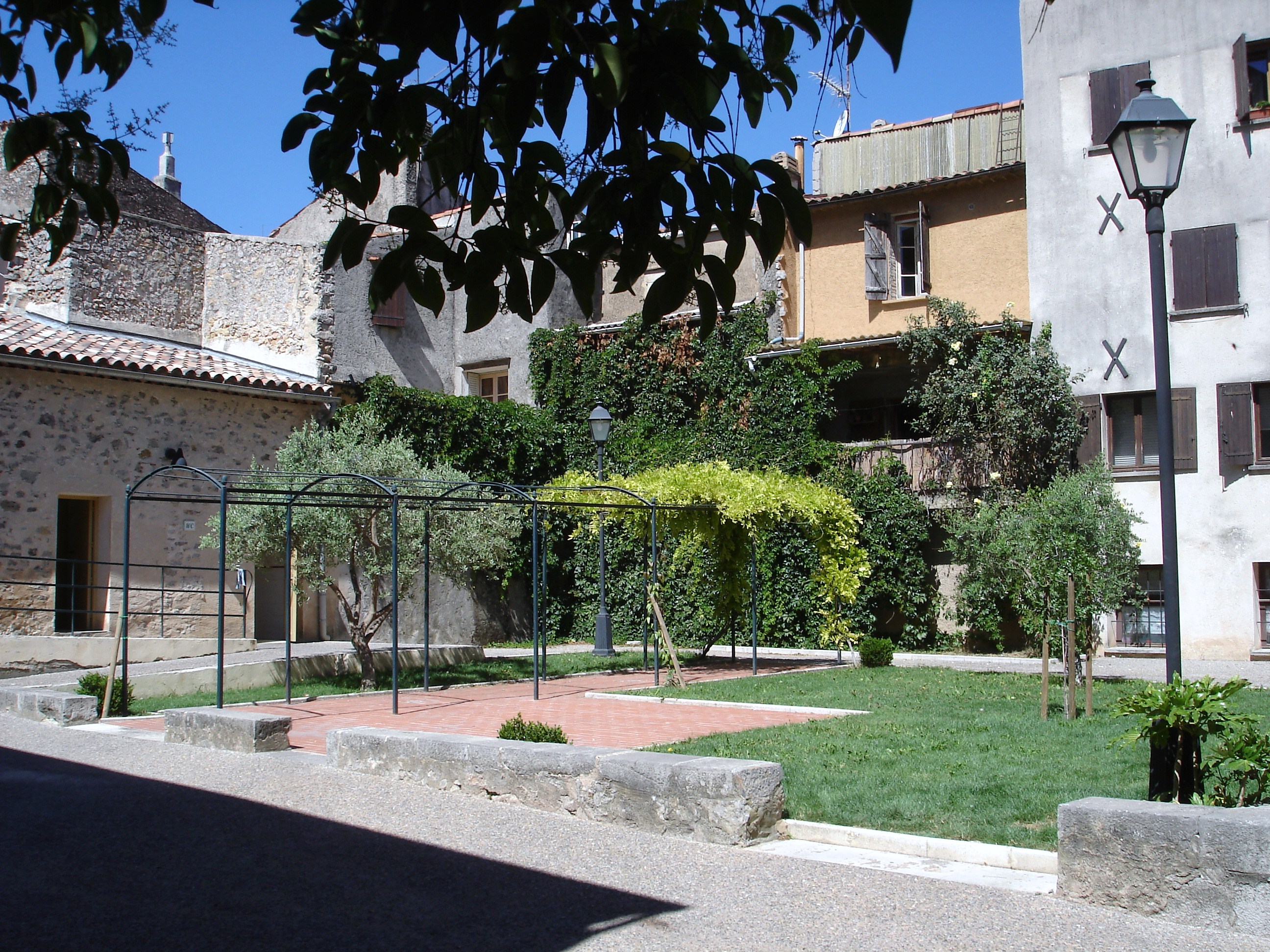 Jardin d'Astros se situant place de la mairie à Tourves dans le département du Var (France)